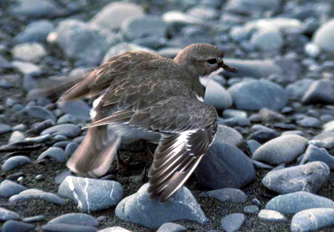 Wrybill young